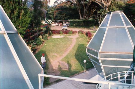 Wondo Genet Wabe Shebele Hotel